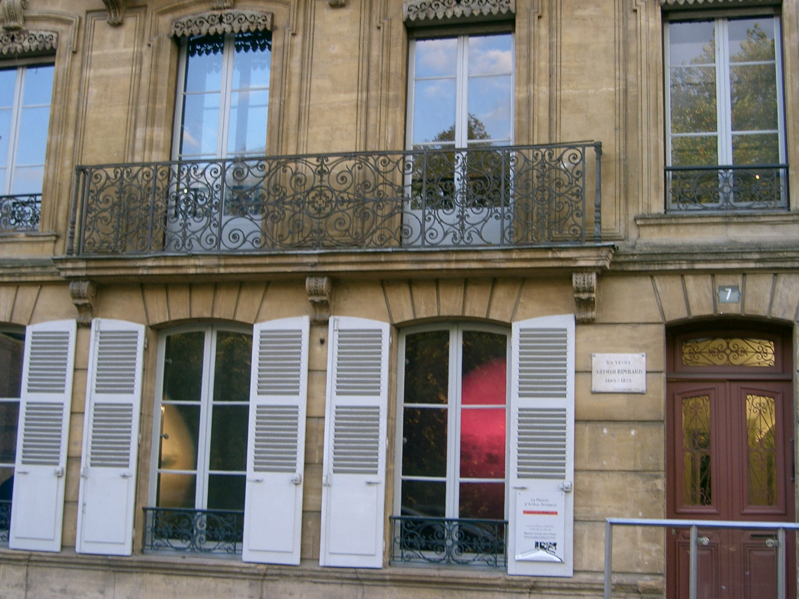 Arthur Rimbaud : appartement familial au premier étage - 7, quai Rimbaud à Charleville. self made PRA Also called: Maison des Ailleurs.